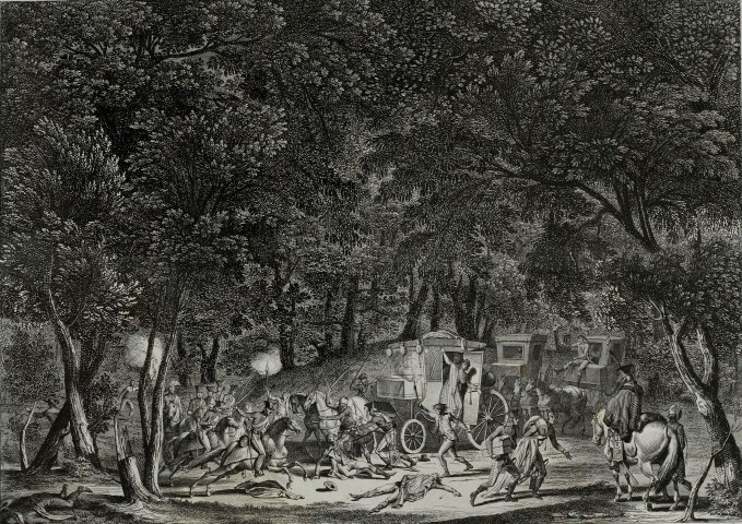 Assassinat diplomates français le 28 avril 1799 près de Rastatt en Allemagne.